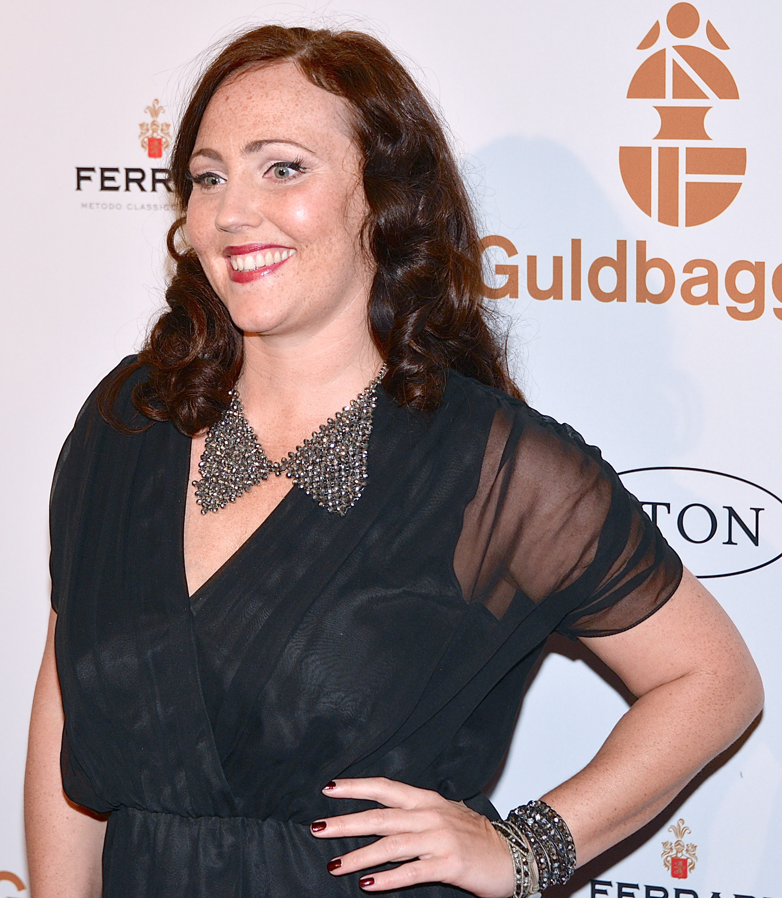 Hanna Hedlund på Guldbaggegalan 21 januari 2013.